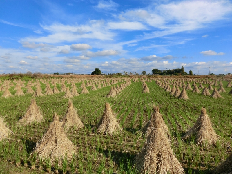 稲刈後の田んぼ 2011年11月